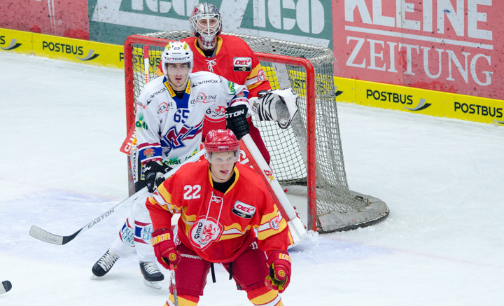 Düsseldorfer EG VS. EHC Biel